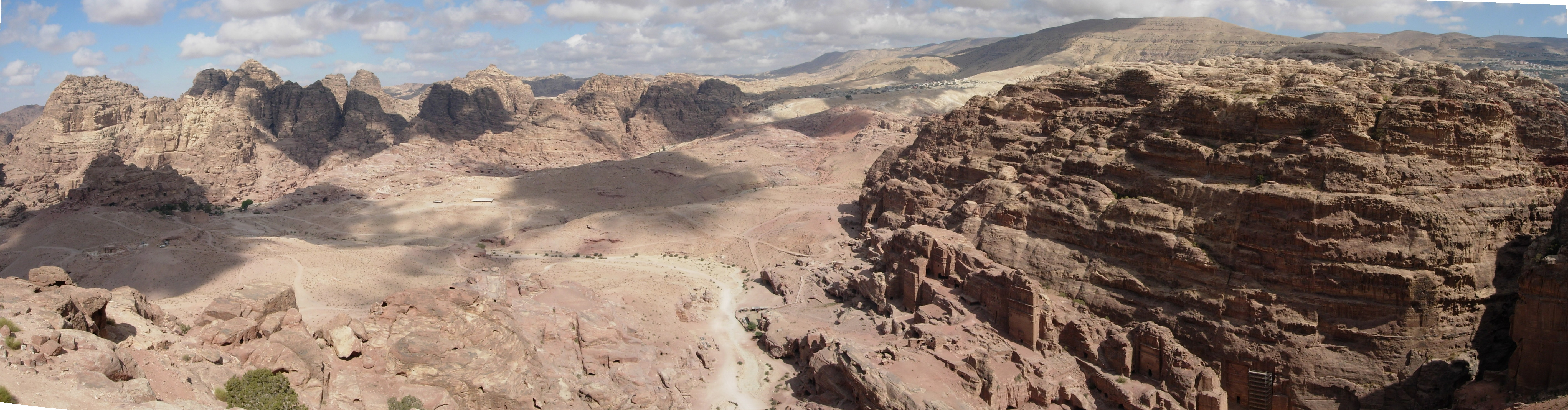 Vue du Haut Lieu de Sacrifice sur la ville basse de Petra